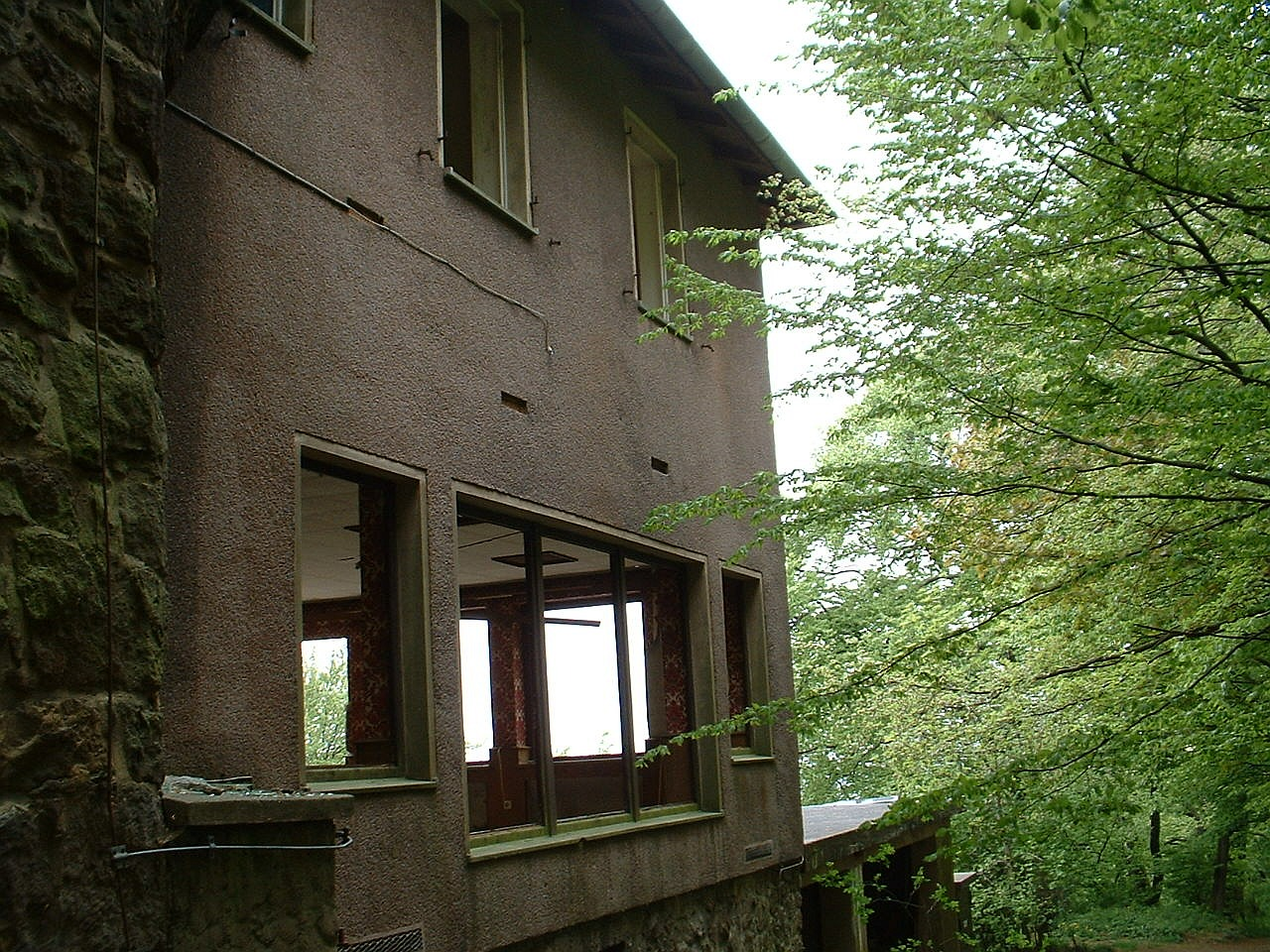 Gaststätte Bismarckburg am Fernsehturm in Porta Westfalica